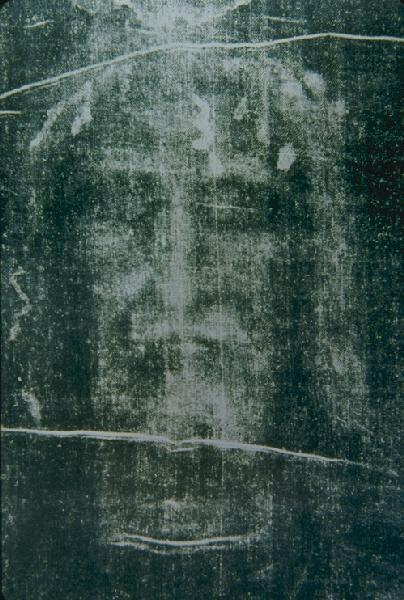 Turiner Grabtuch Fotonegativ mit dem Gesicht.